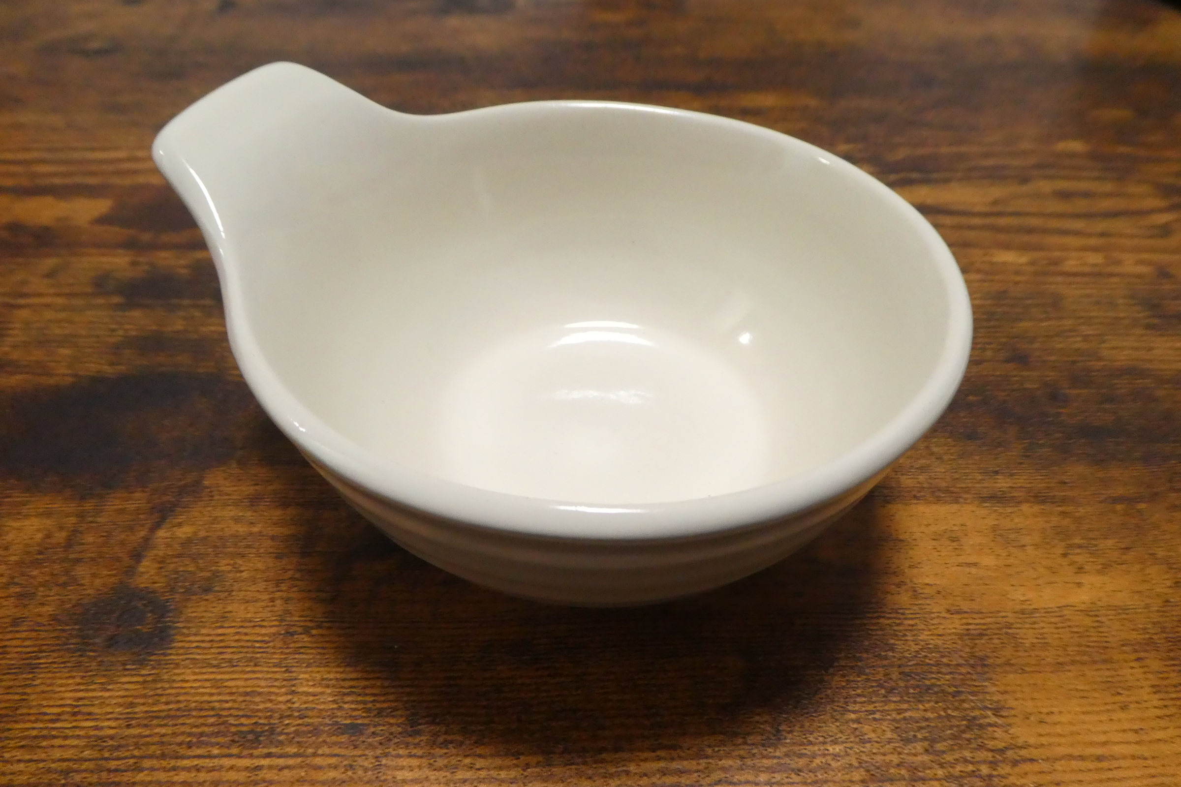 呑水（とんすい）。鍋料理の取り皿として使われる。